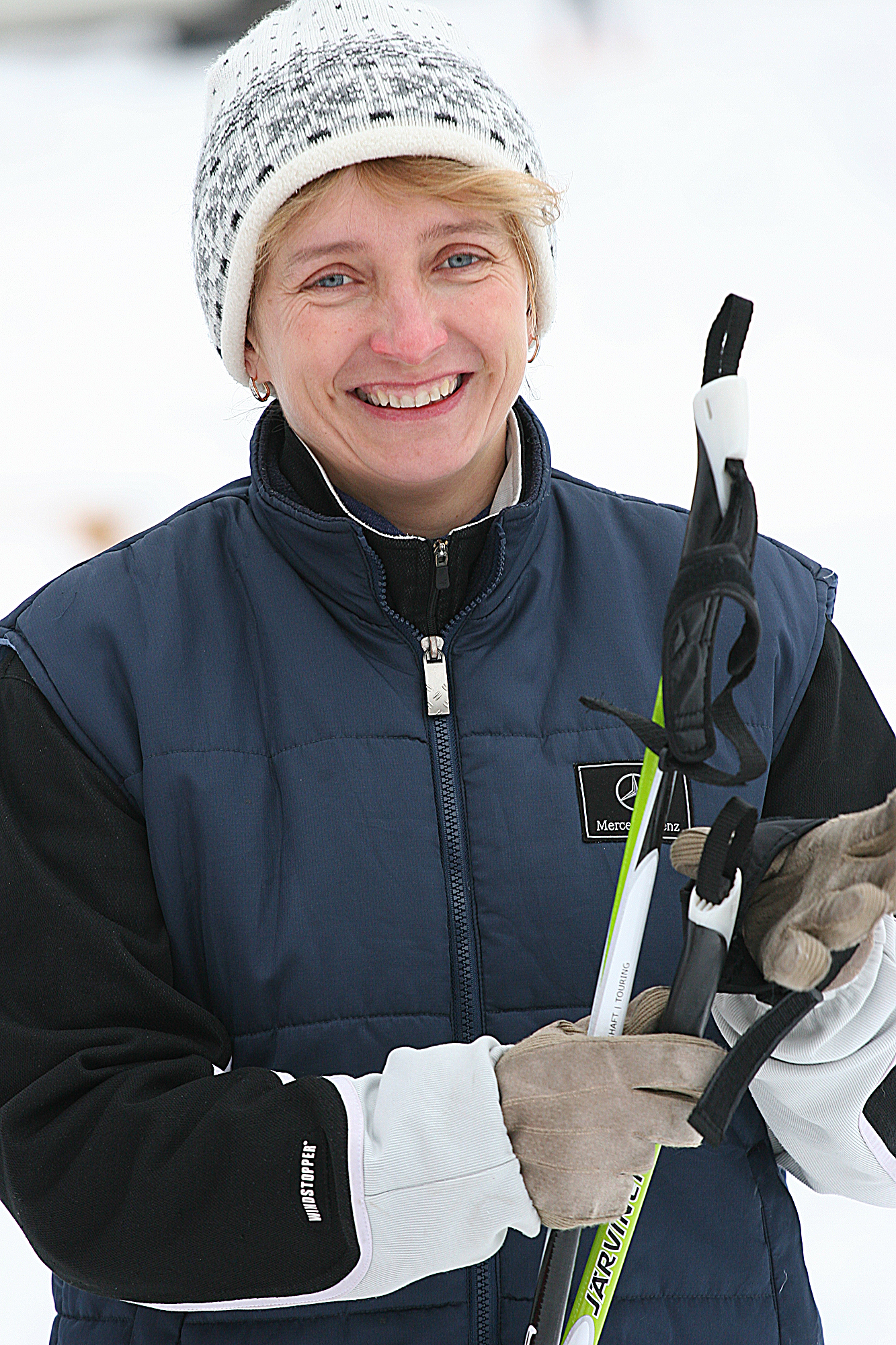 Erika Ader